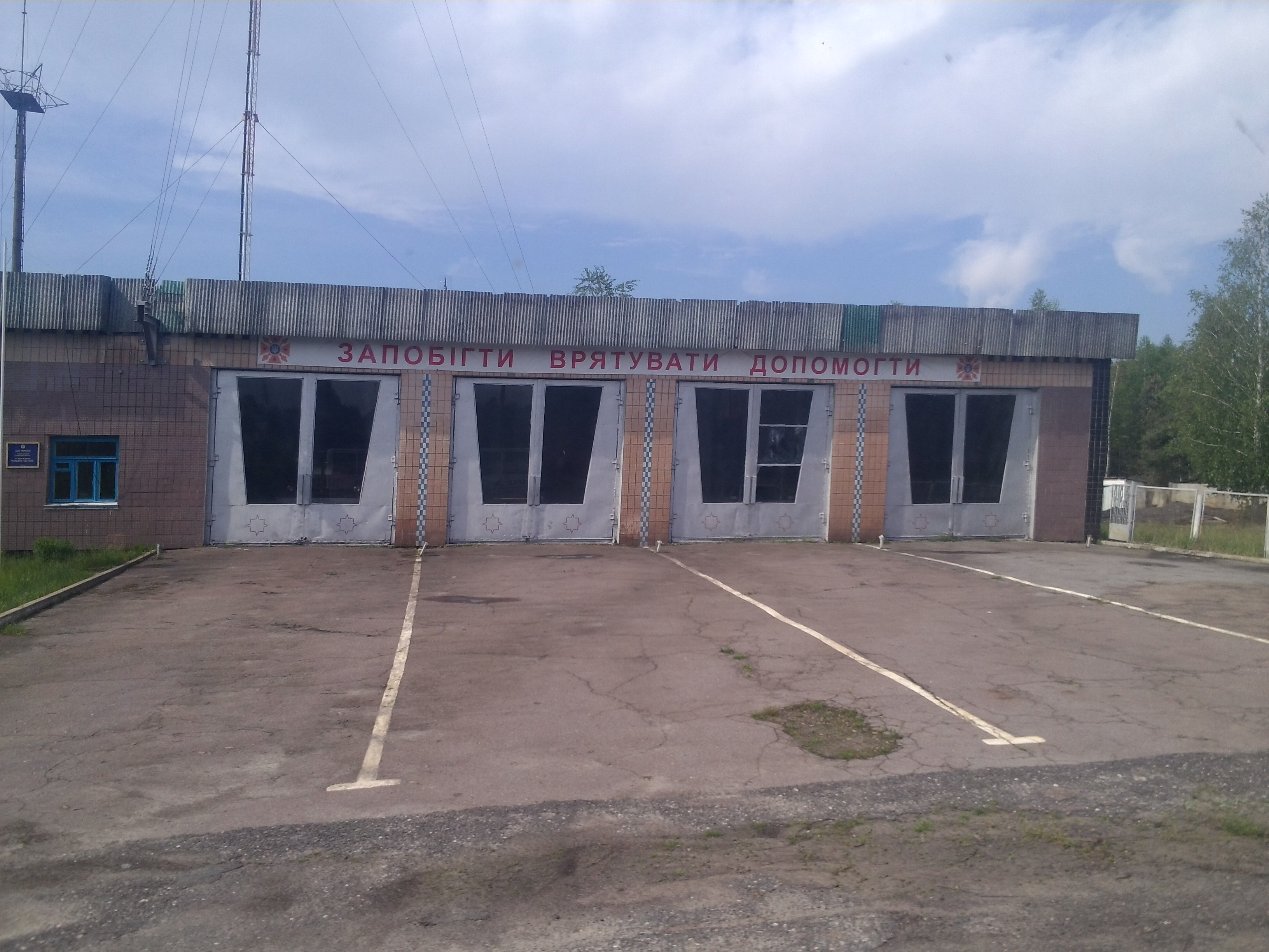 смт Вільча. Пожежна станція